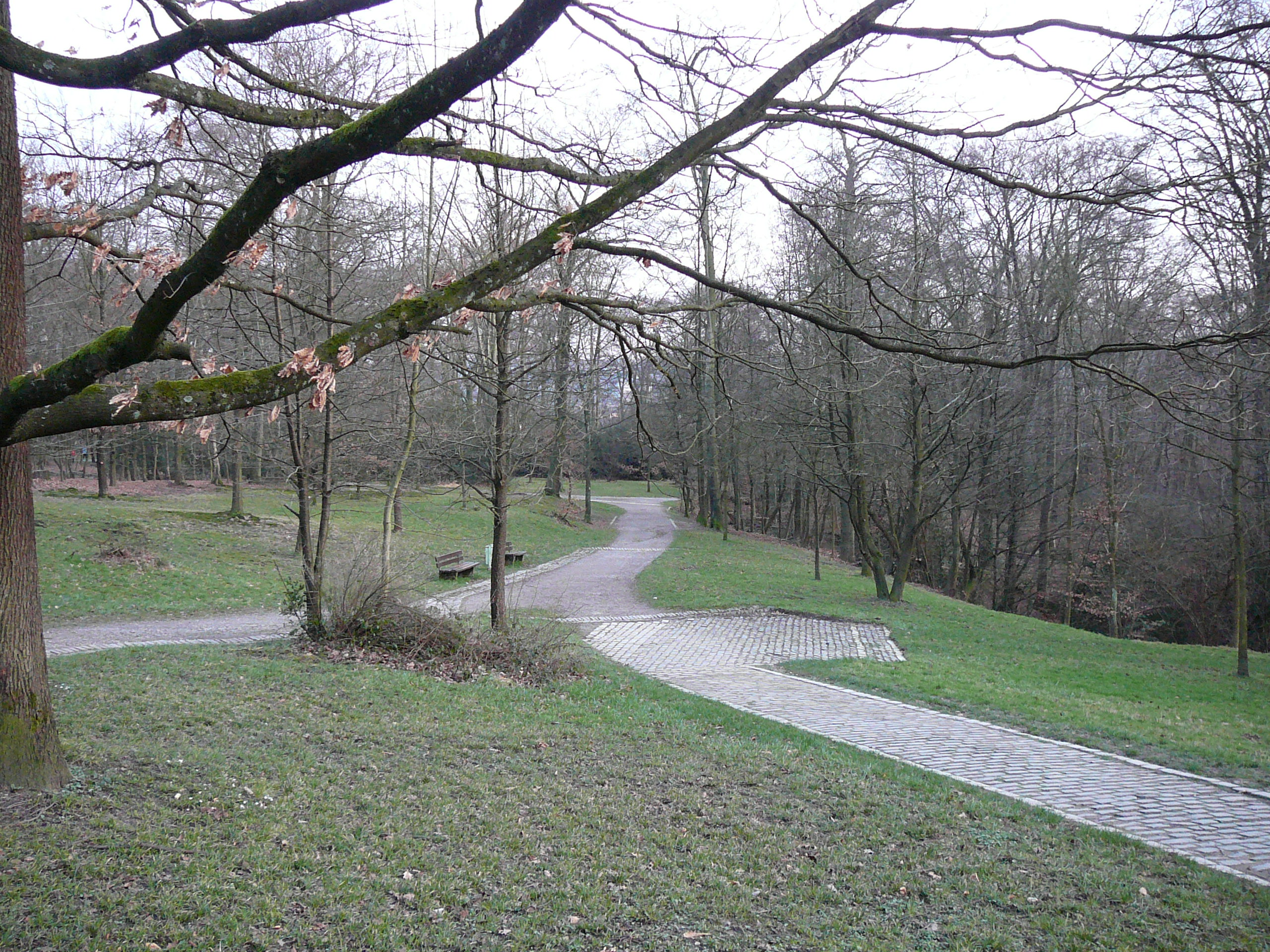 Vogelsangstraße, Wuppertal-Elberfeld